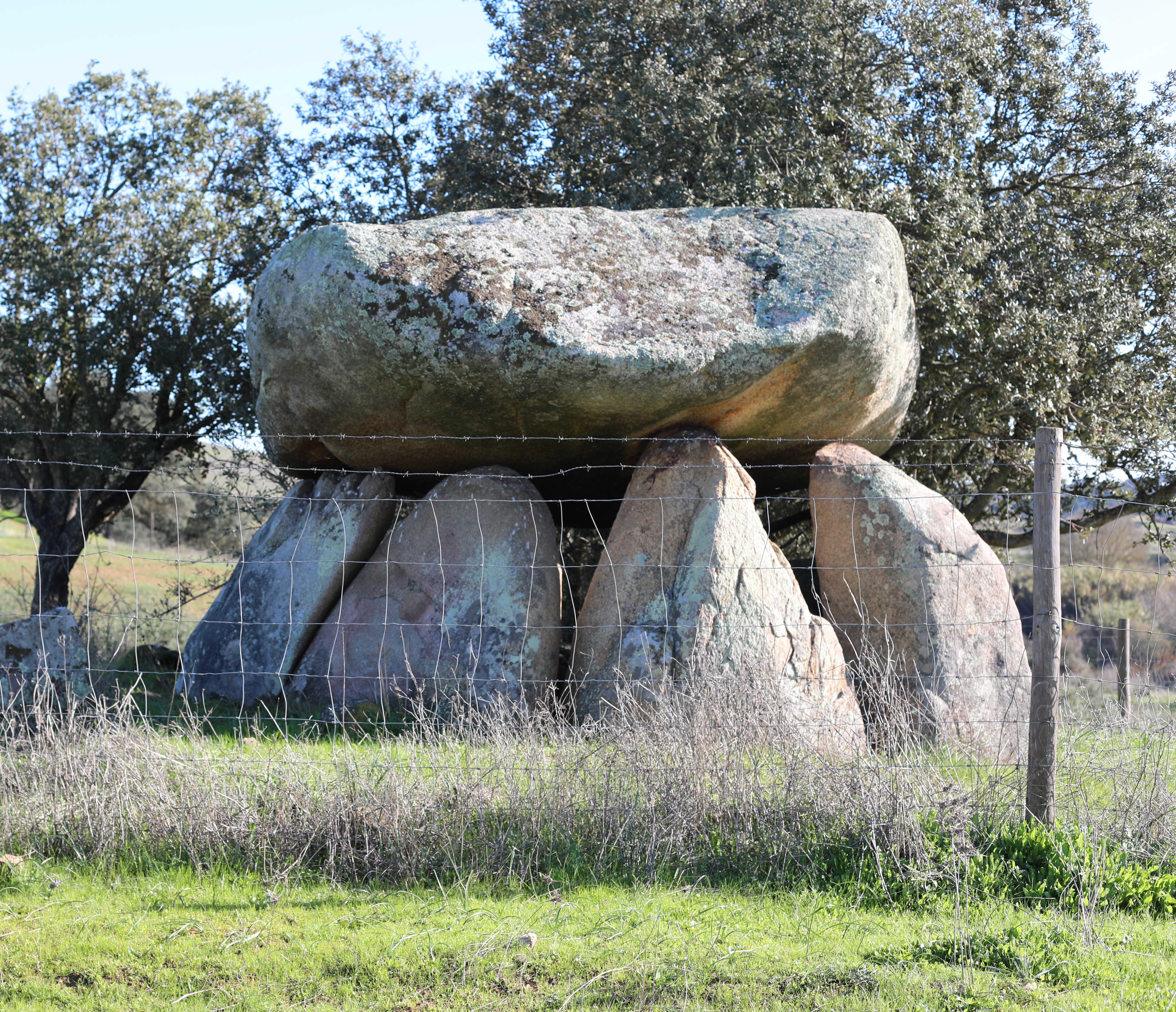 Anta 1 - Dezembro de 2018